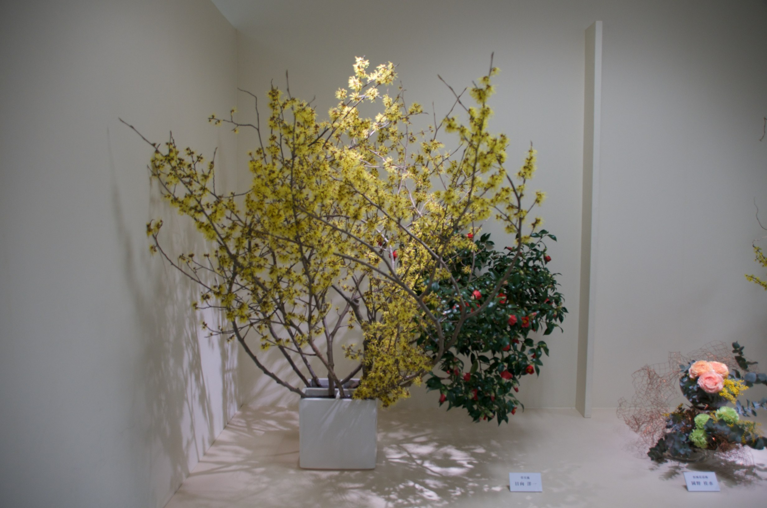 ikebana arrangement